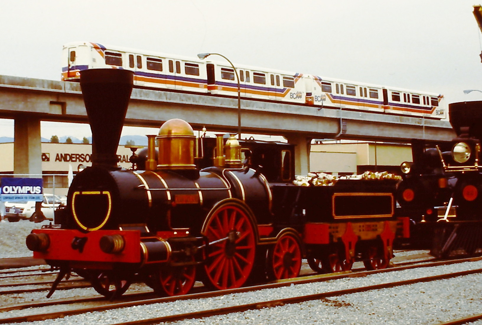 Replikat der Dampflokomotive John Molson auf der EXPO '86 in Vancouver